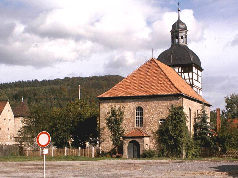 Kirche in Untermaßfeld Aufnahmezeit: 2005 Fotograf: Michael Benz